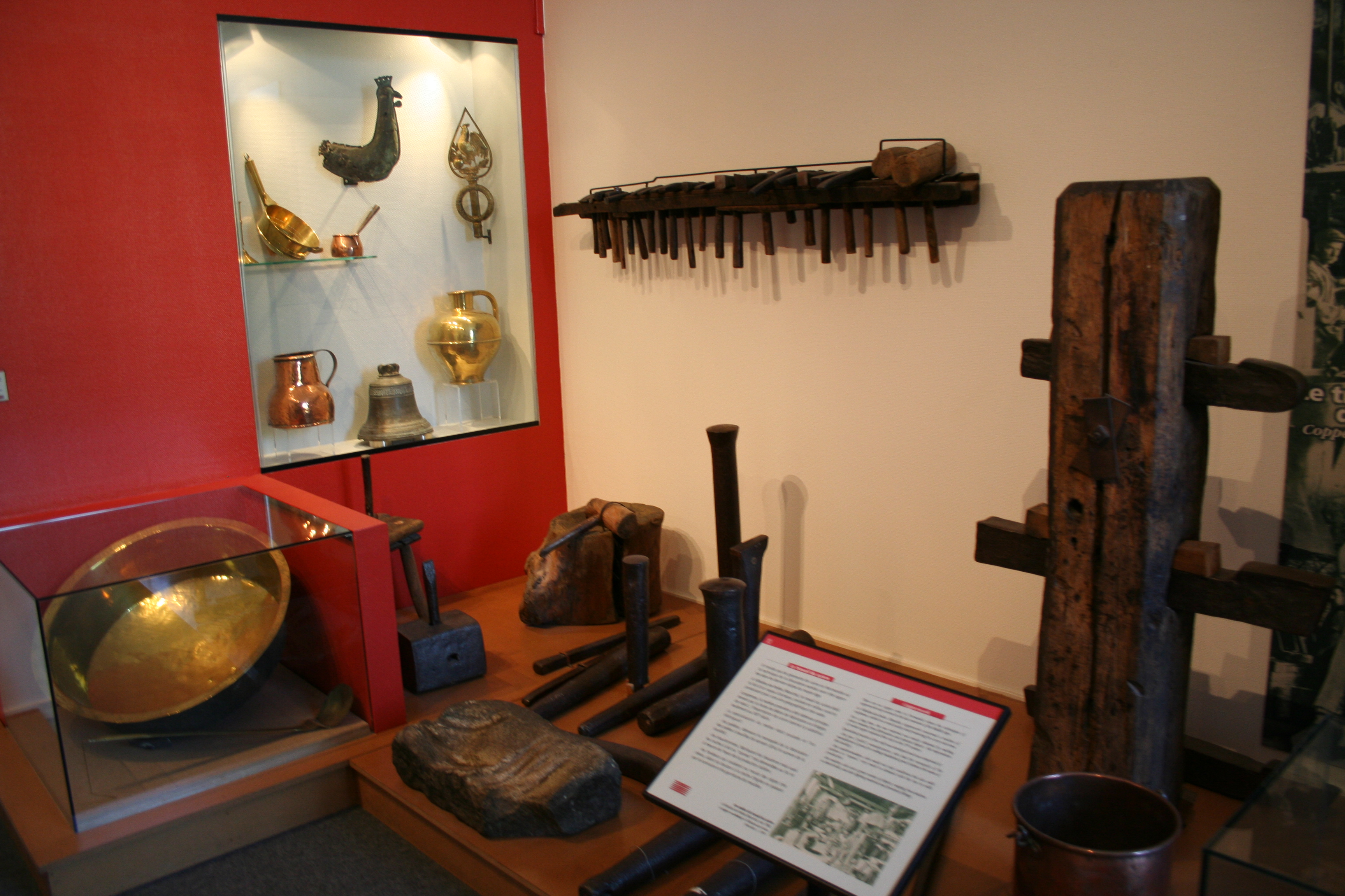 atelier de chaudronnier